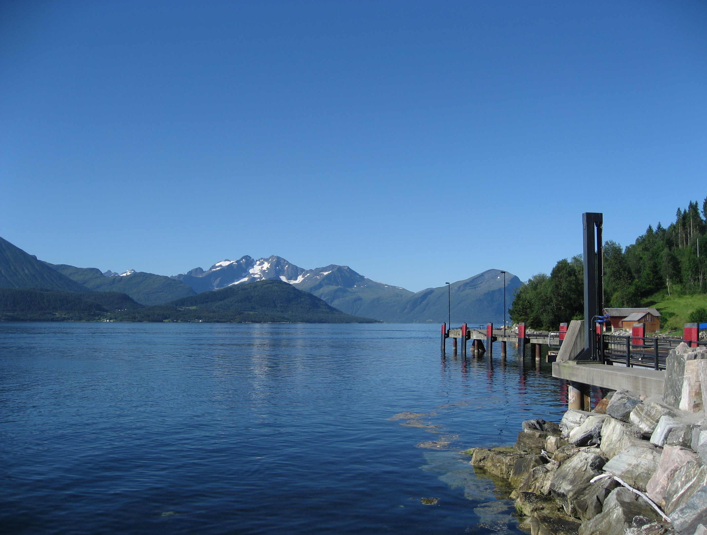 Fergekaien i Magerholm, Norge